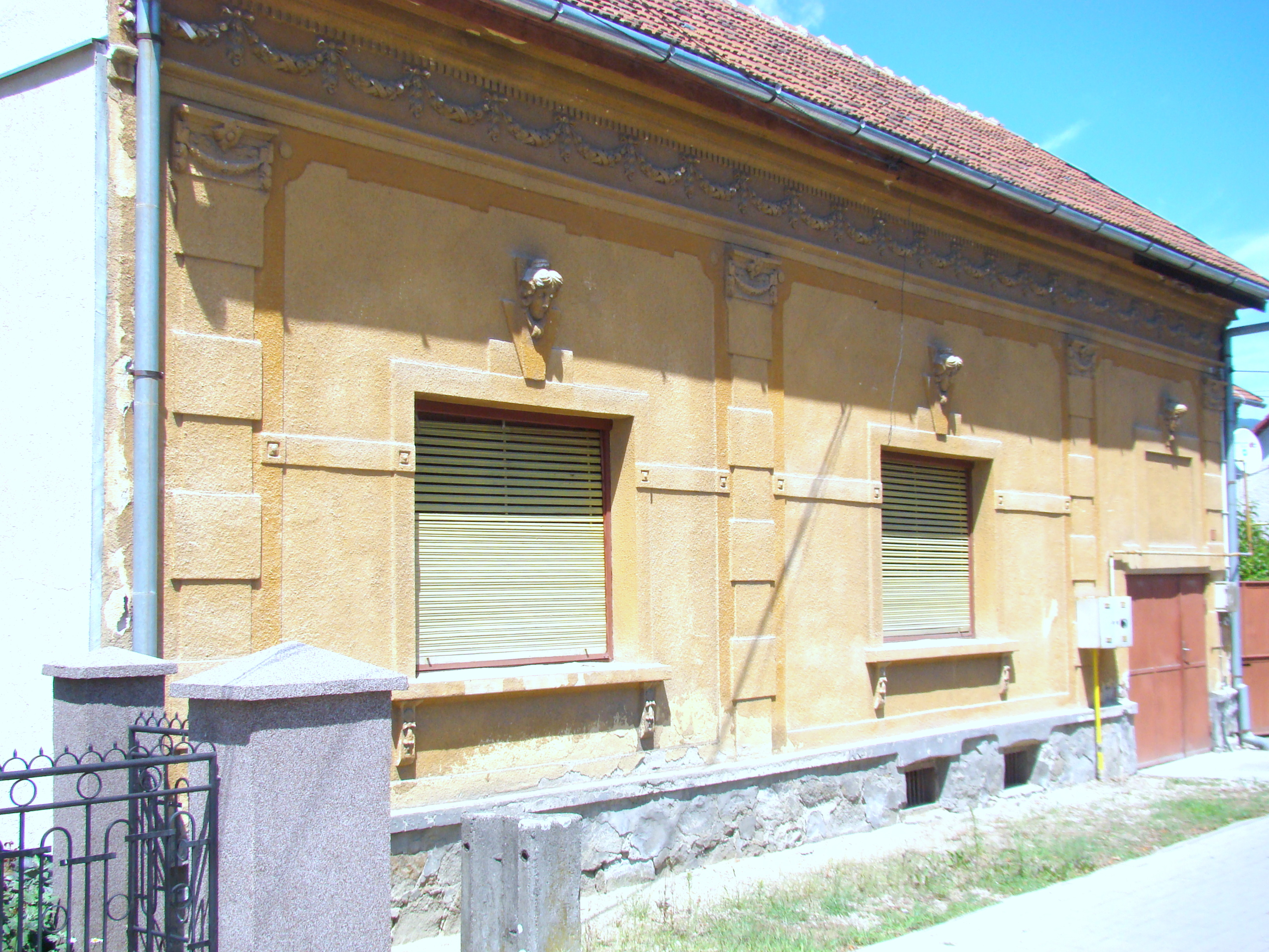 Casa fotografului Norbert Taugner, azi locuință, oraș Oțelu Roșu, Str. Republicii 67